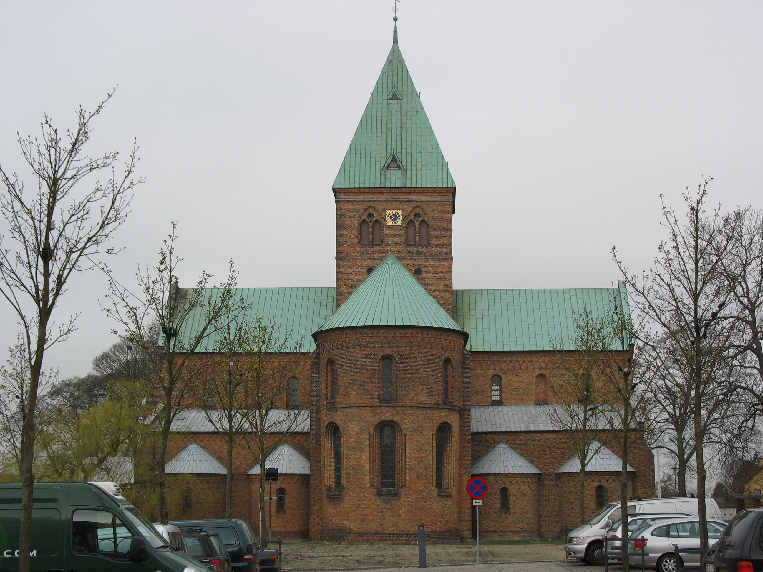 Skt. Bendts Kirke i Ringsted